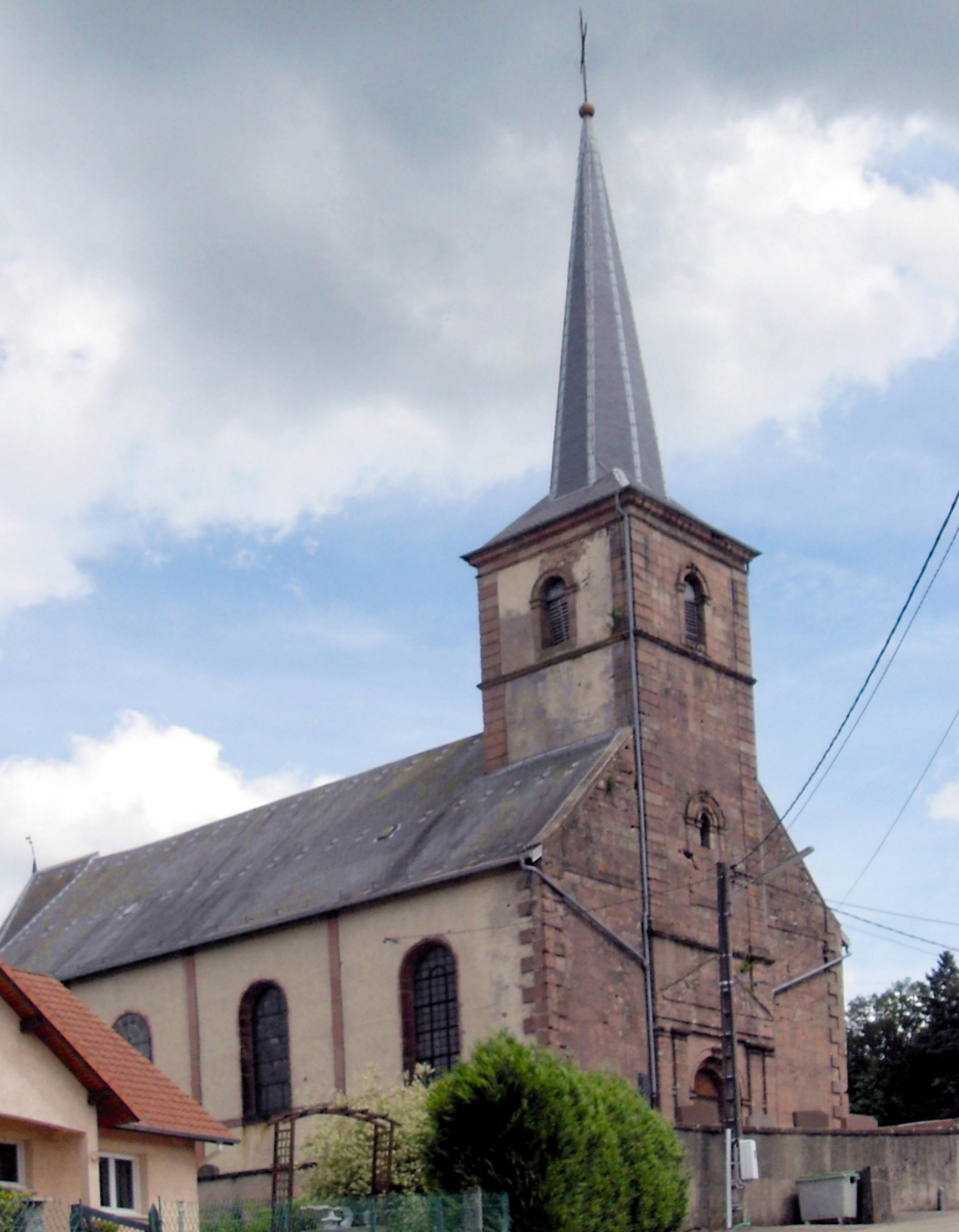 L'église_Saint-Maurice à Vieux-Moulin